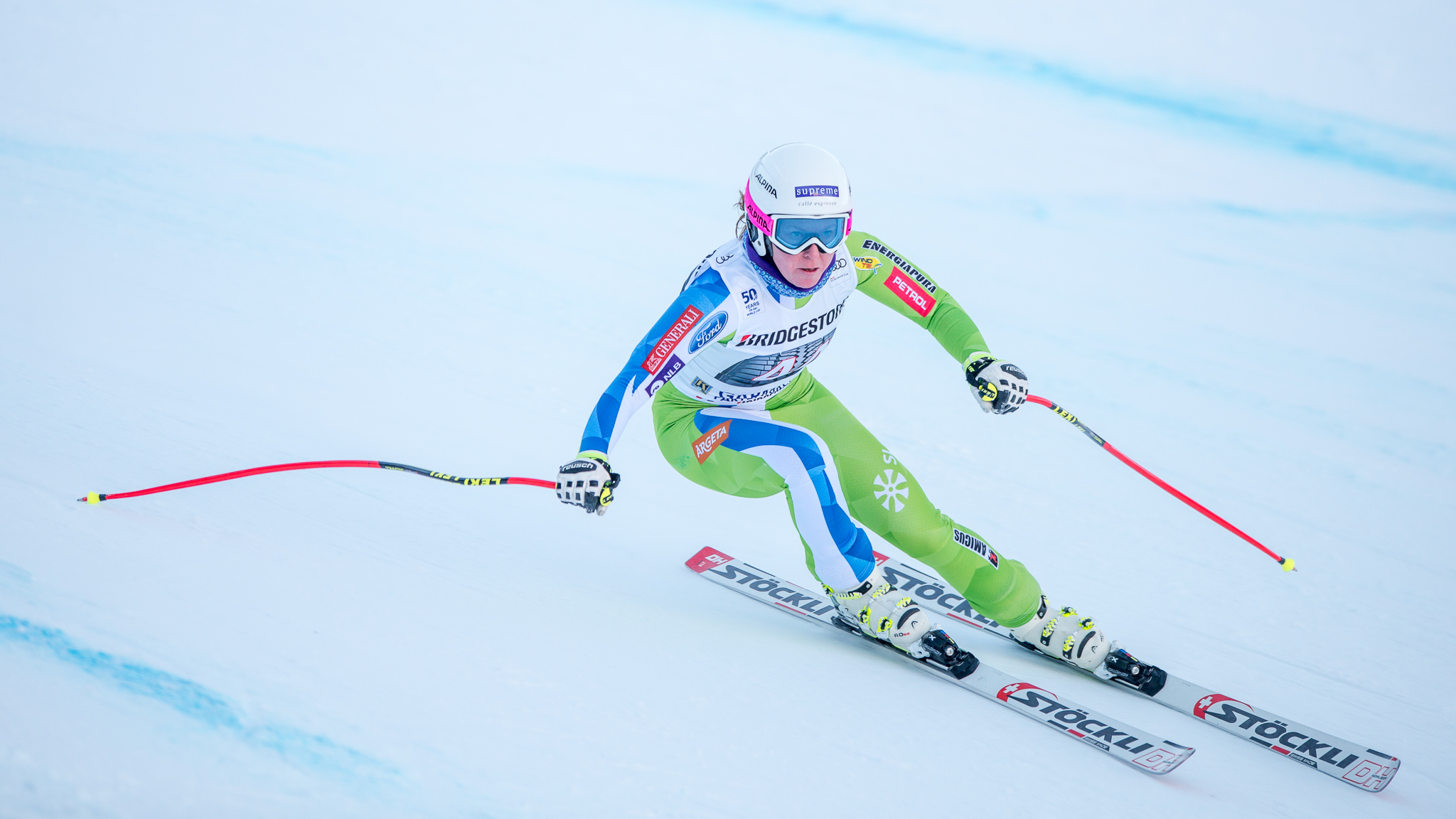 64. Kandahar Rennen,Audi FIS Ski Weltcup Garmisch-Partenkirchen,Damen Abfahrt,Kandahar,Ladies Downhill,Marusa Ferk,Maruša Ferk